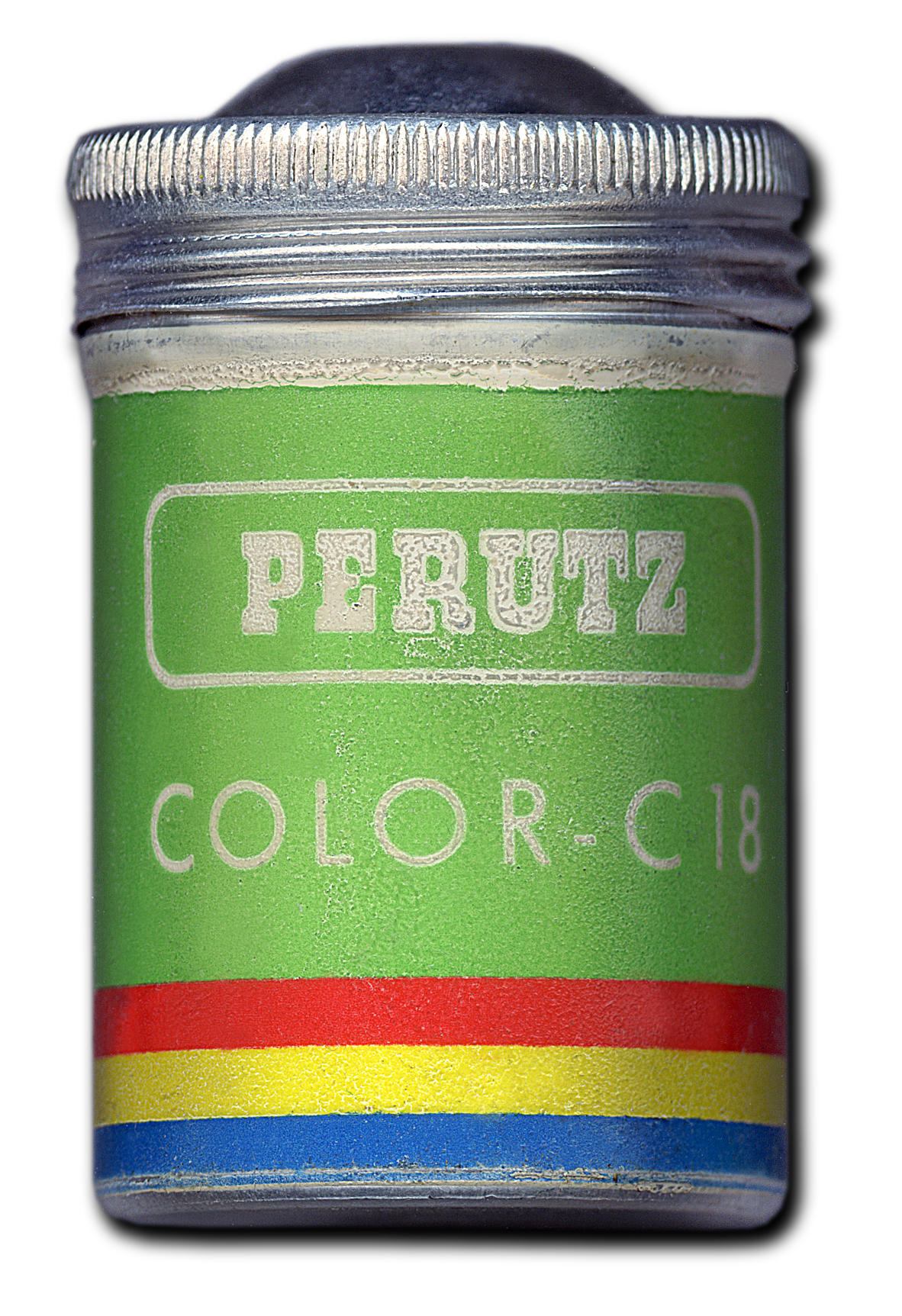 Filmdose für den Tageslicht-Farbfim Perutz C 18 (18 DIN), vor 1964. Die daraus entwickelten Perutz-C 18-Dias galten als besonders Farbrein und Farbsättigend. Das zur Herstellung dieses Films benötigte Verfahren hatte Perutz laut der Zeitschrift „Foto Prisma“, Ausg. 9, Düsseldorf 1958. S. 621 „erst vor kurzem" vorgestellt.